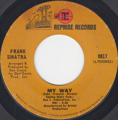 Frank Sinatra - My Way (SP, first release, US, 1969)